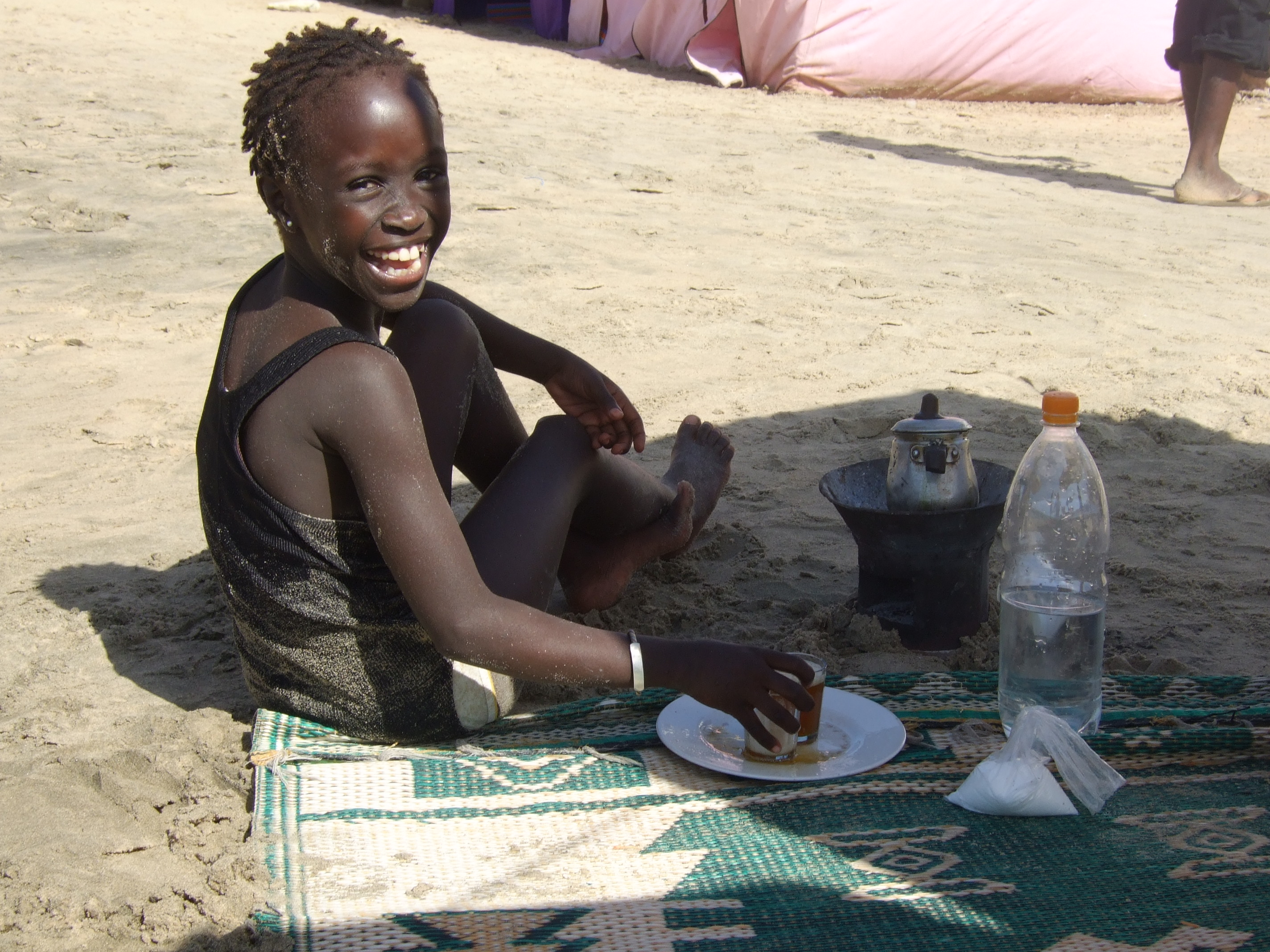 Tob trabaja en la playa de Ngor, junto a Dakar, preparando y sirviendo el té ataya a cambio de unas monedillas. Tiene sólo 5 años.